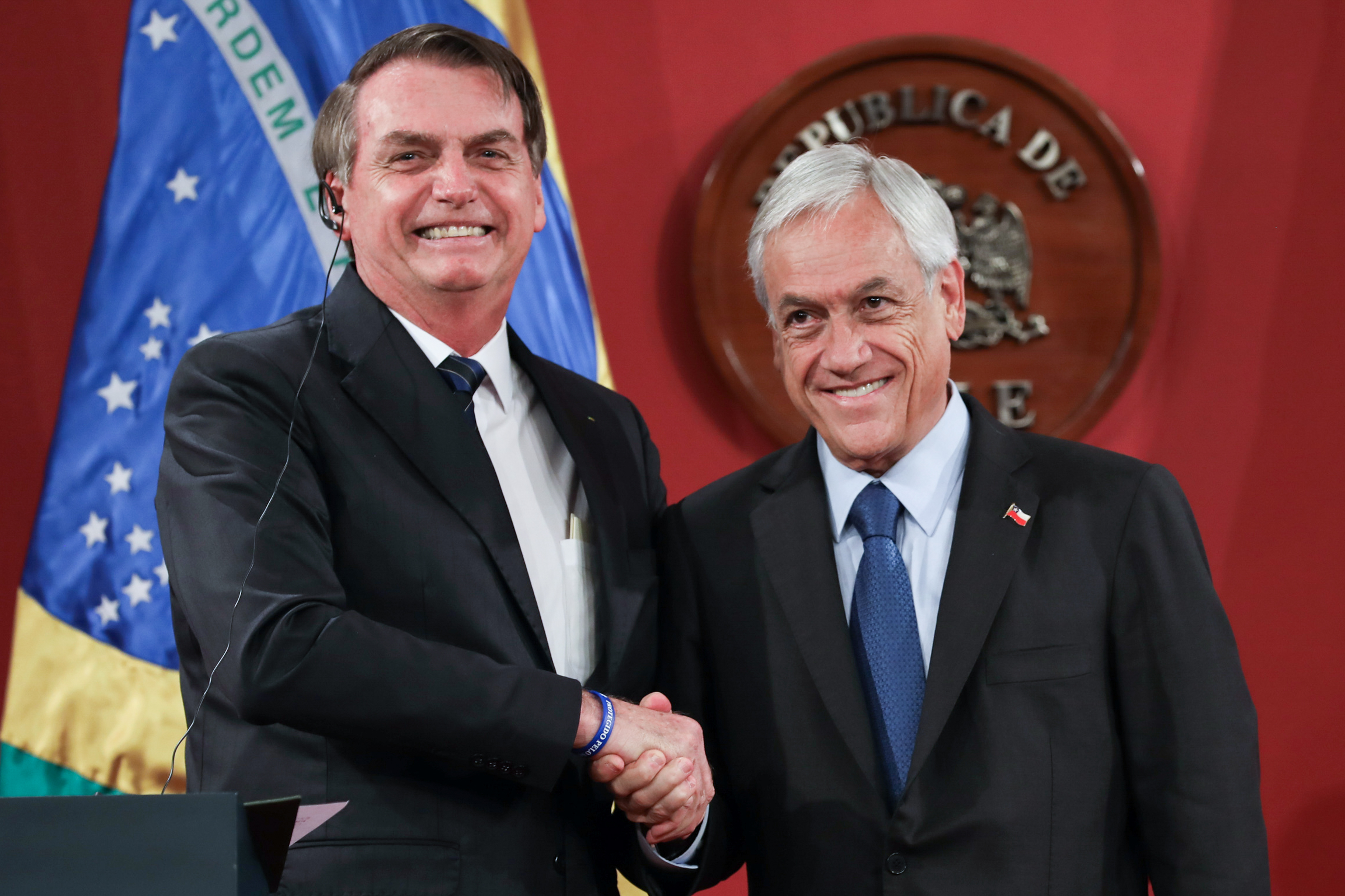 (Santiago - Chile, 23/03/2019) Presidente da República, Jair Bolsonaro durante Declaração à imprensa. Foto: Marcos Corrêa/PR